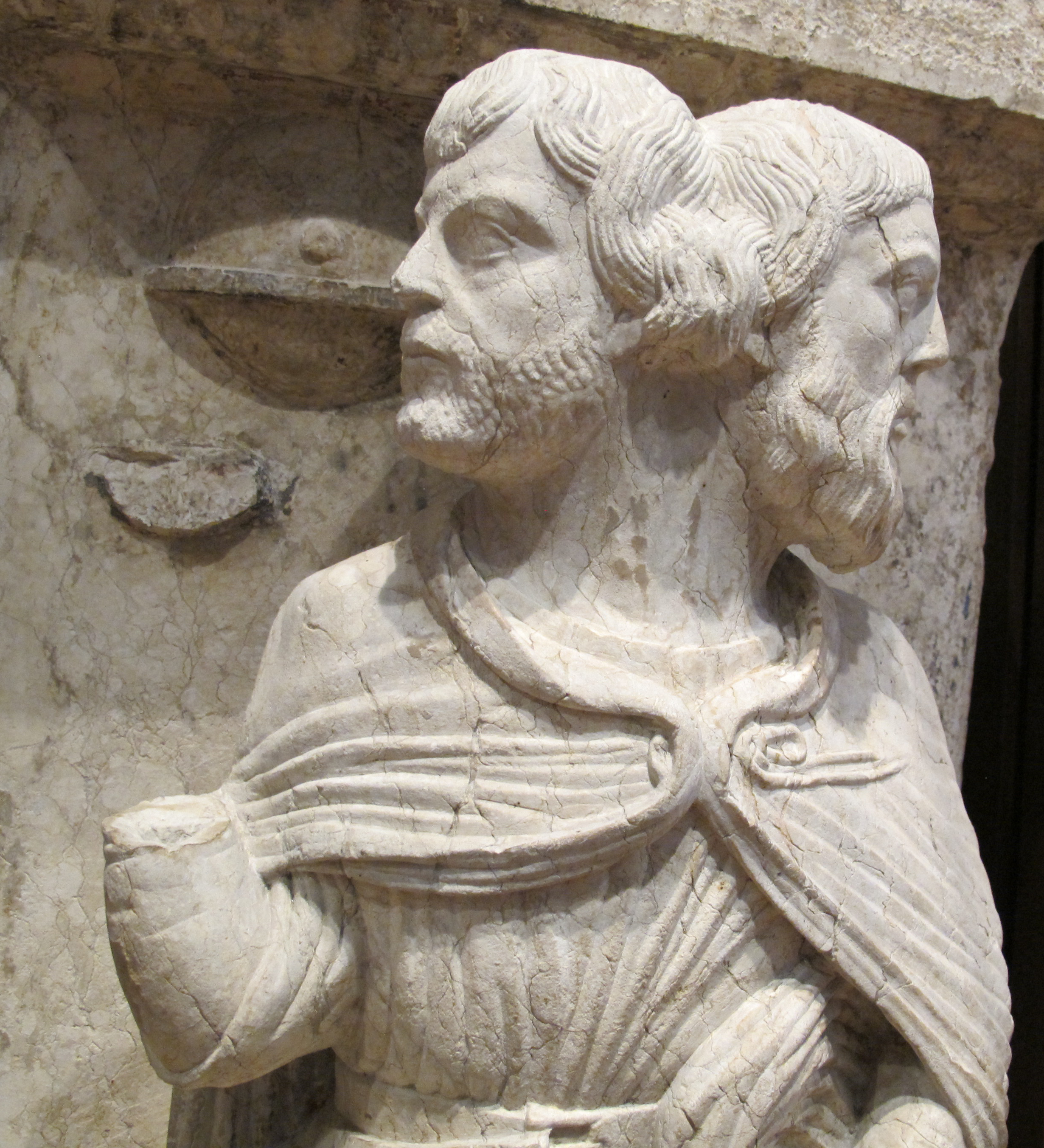 Museo della Cattedrale This is a photo of a monument which is part of cultural heritage of Italy.